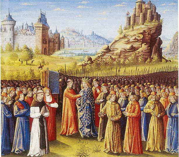 « Louis VII prend la croix à Vézelay en présence de saint Bernard » (en haut). Miniature extraite des Passages faits outre-mer par les Français contre les Turcs et autres Sarrazins et Maures outre-marins (vers 1490) de Sébastien Mamerot. (Bibliothèque nationale de France, Paris.)